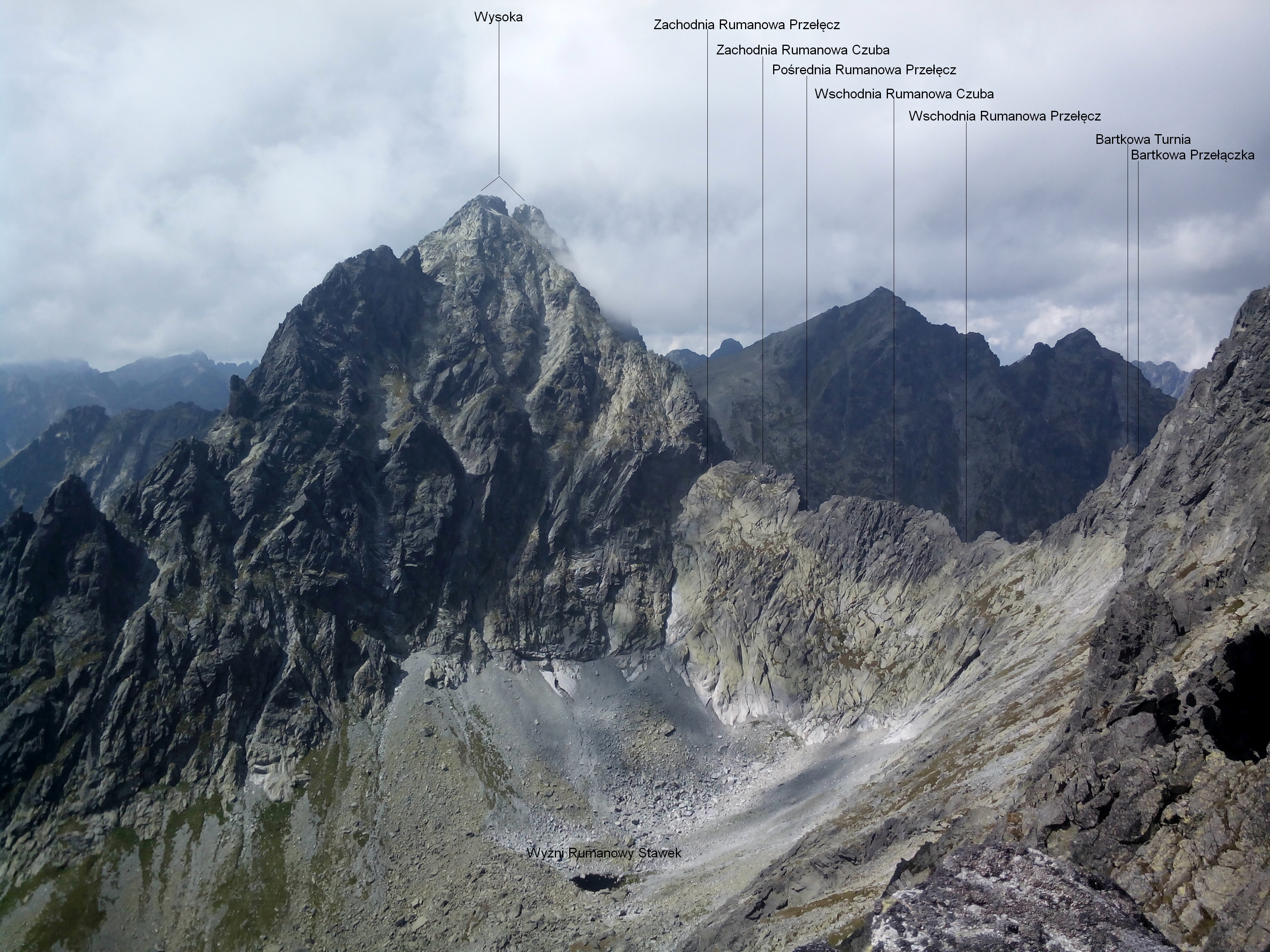 Widok ze Żłobistego Szczytu na Wysoką i Dolinę Rumanową